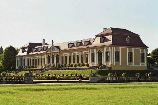 Barockgarten Heidenau-Gro�sedlitz: Blick auf die obere Orangerie